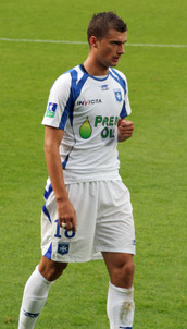 Gabriel Tamas, le défenseur roumain de l'AJA lors de la saison 2007-2008.